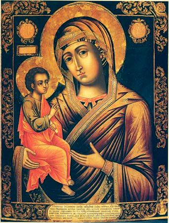 Изображение русской иконы Гребневской Богоматери предположительно 14 века